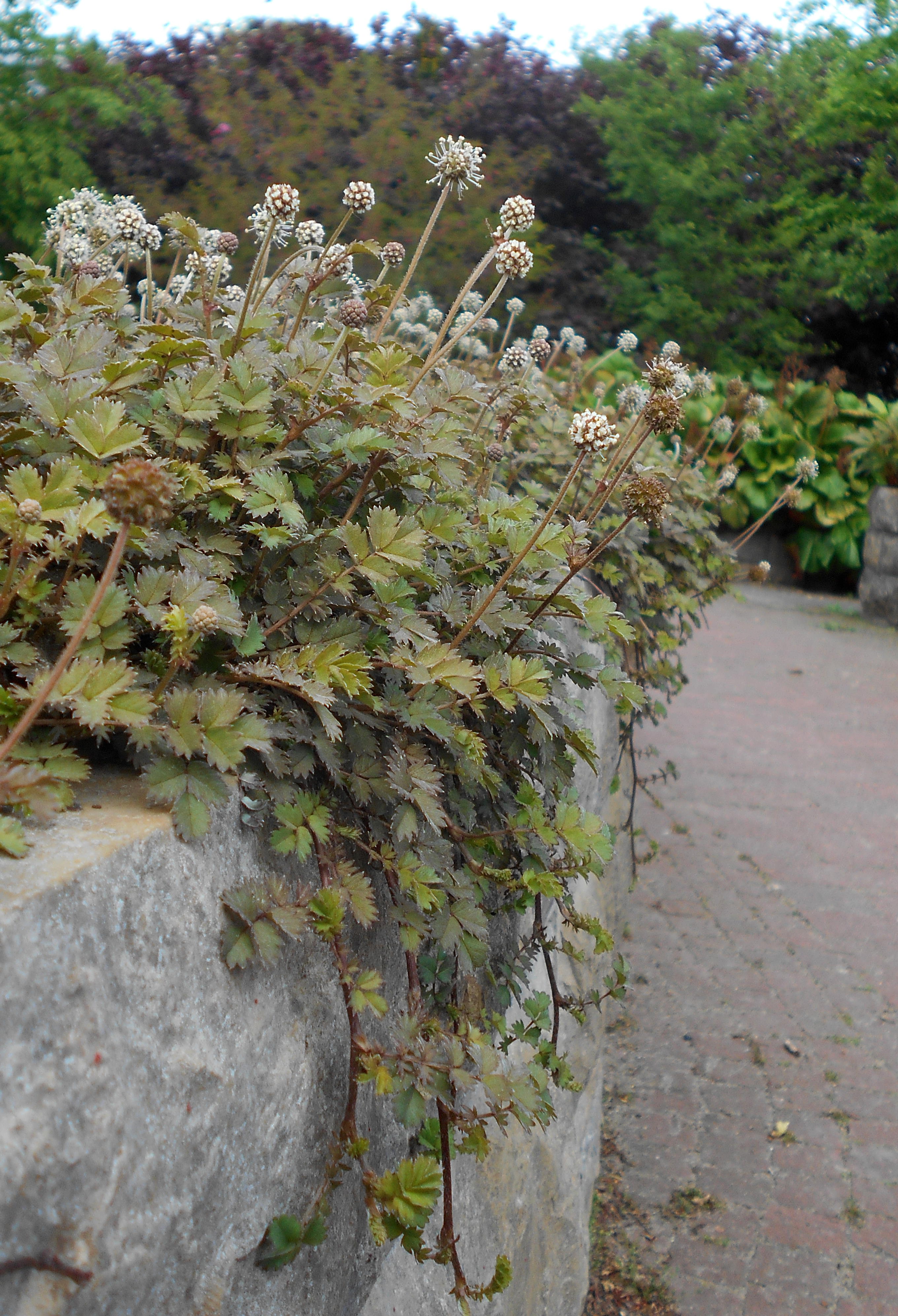 Acena drobnolistna (Acaena microphylla), Botanischer Garten Berlin.